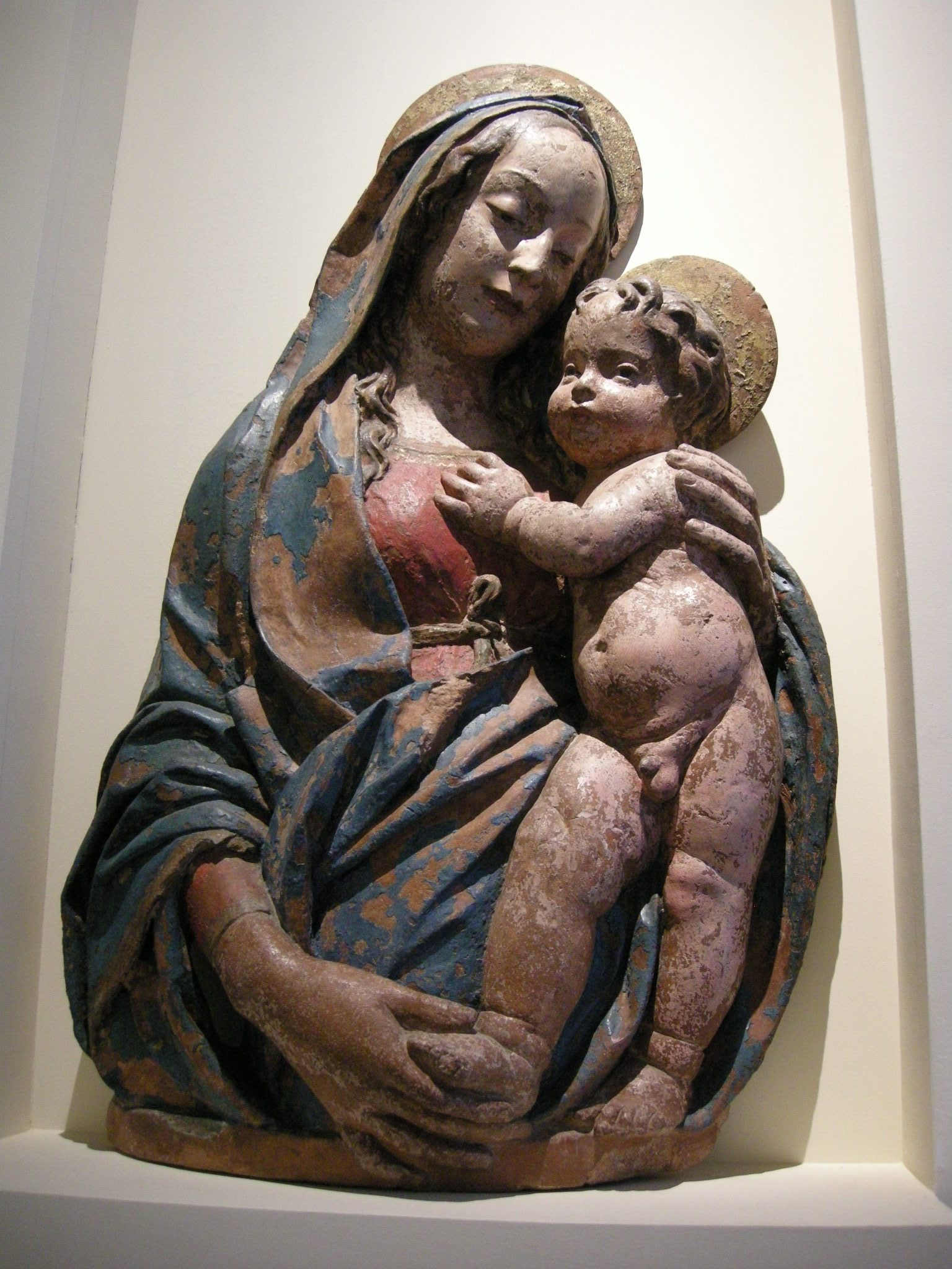 Matteo civitali, madonna col bambino, 1495 circa